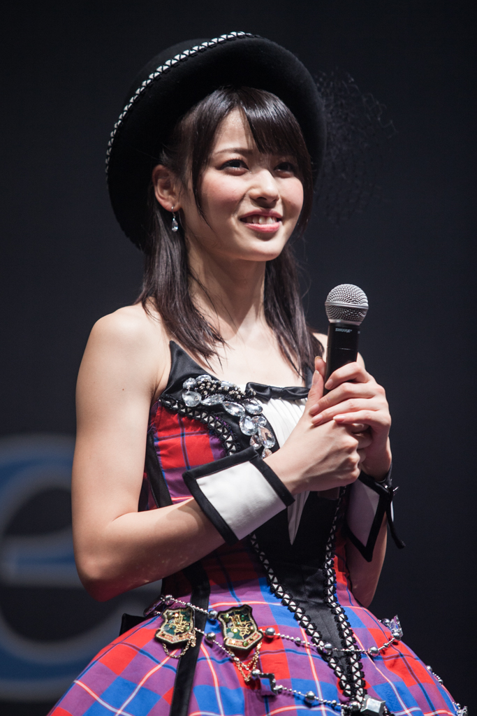 Berryz Kobo x °C-ute